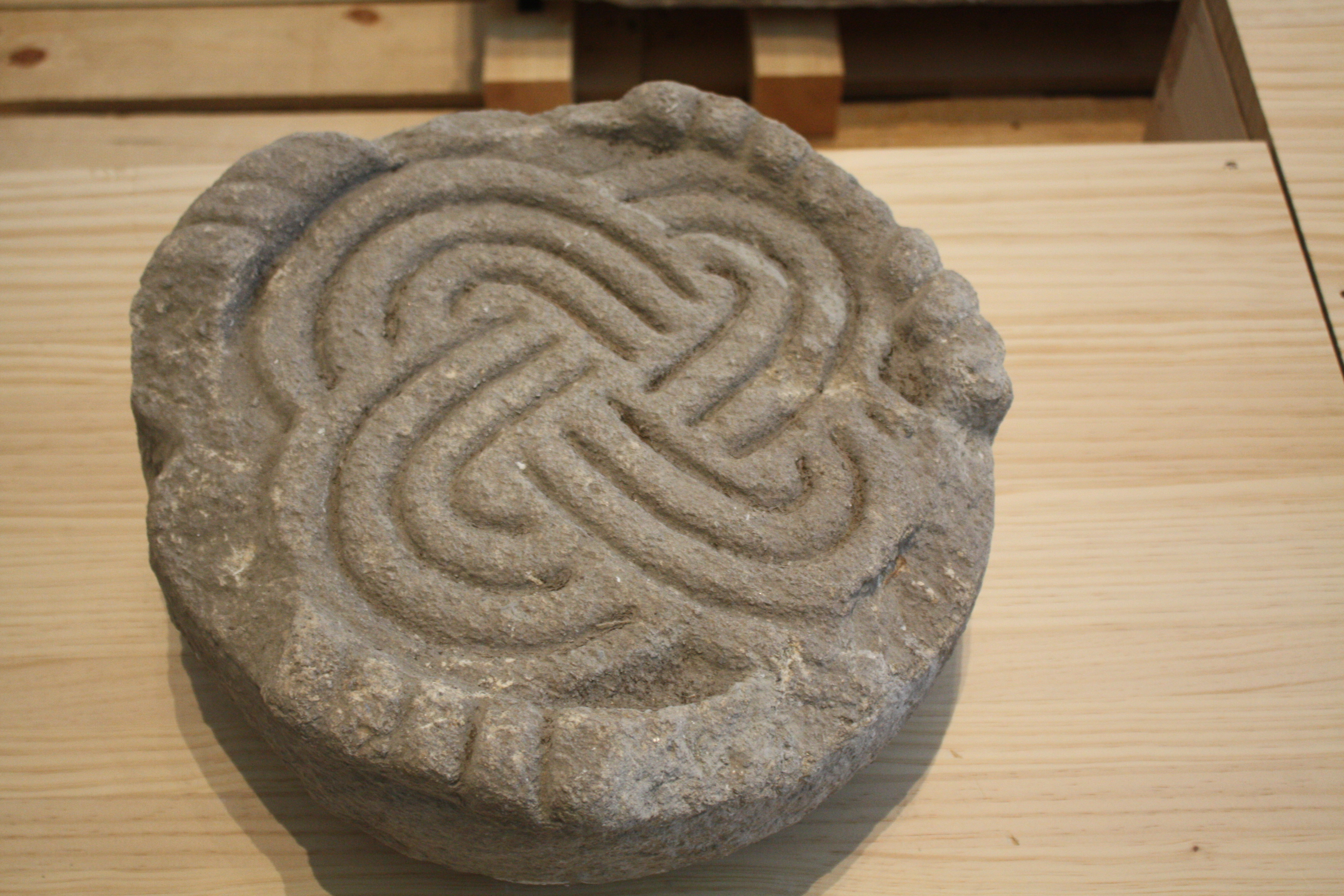 Nó de Salomón, esvástica do s. II aC ó I dC, procedente do Castro de Santa Trega (A Guarda, Pontevedra) e exposto no museo do mesmo castro.